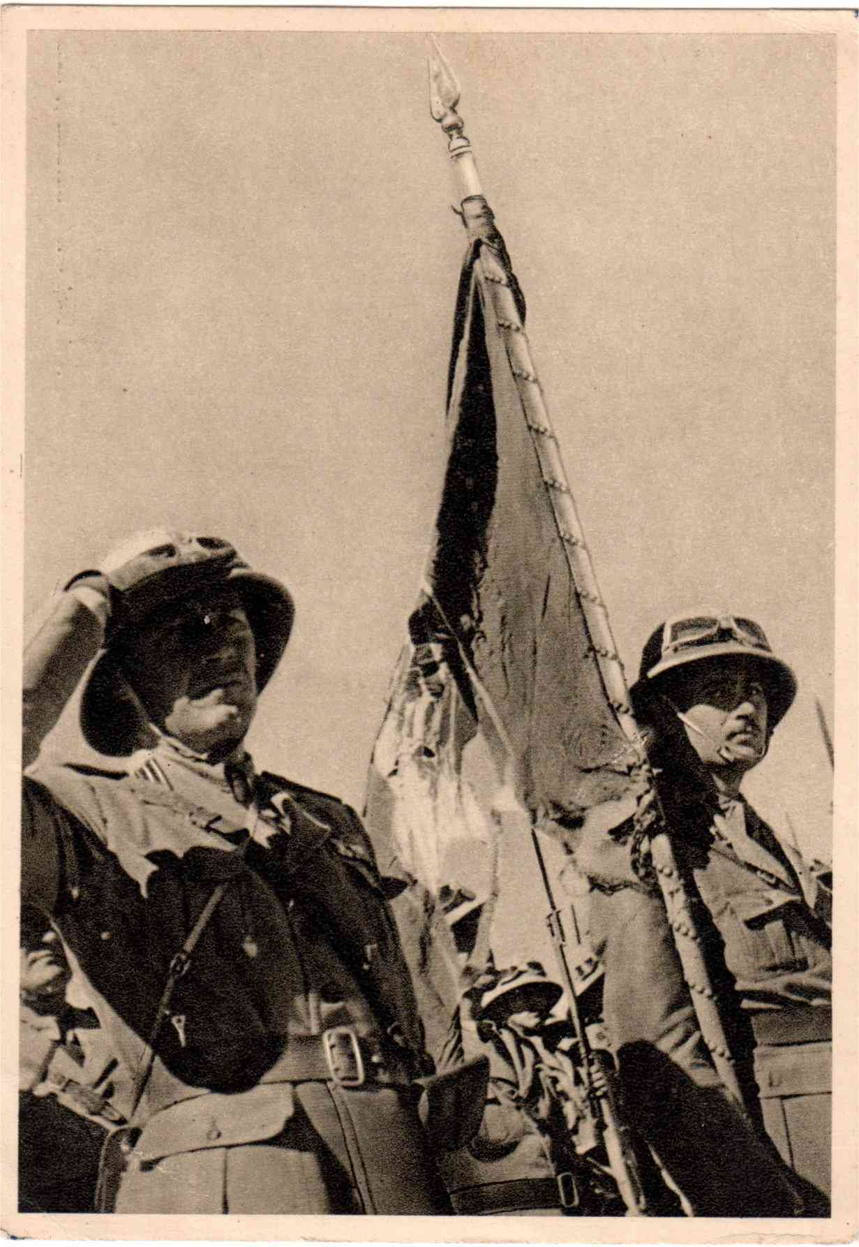 Serie:Visioni della conquista dell’Impero –la bandieradel 13° regg. Fanteria Pinerolo